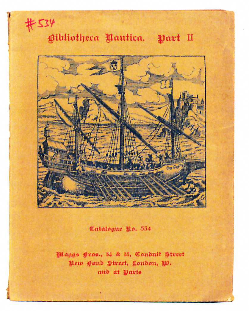 Maggs Bros Ltd Catalogue 534